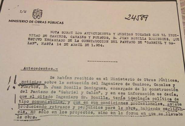 Informe de antecedentes políticos del Ingeniero de caminos D Juan Bonilla Dominguez de ideología comunista y los prejuicios y retrasos de la obra del pantano "Gabriel y Galán" -Boñar- (León)